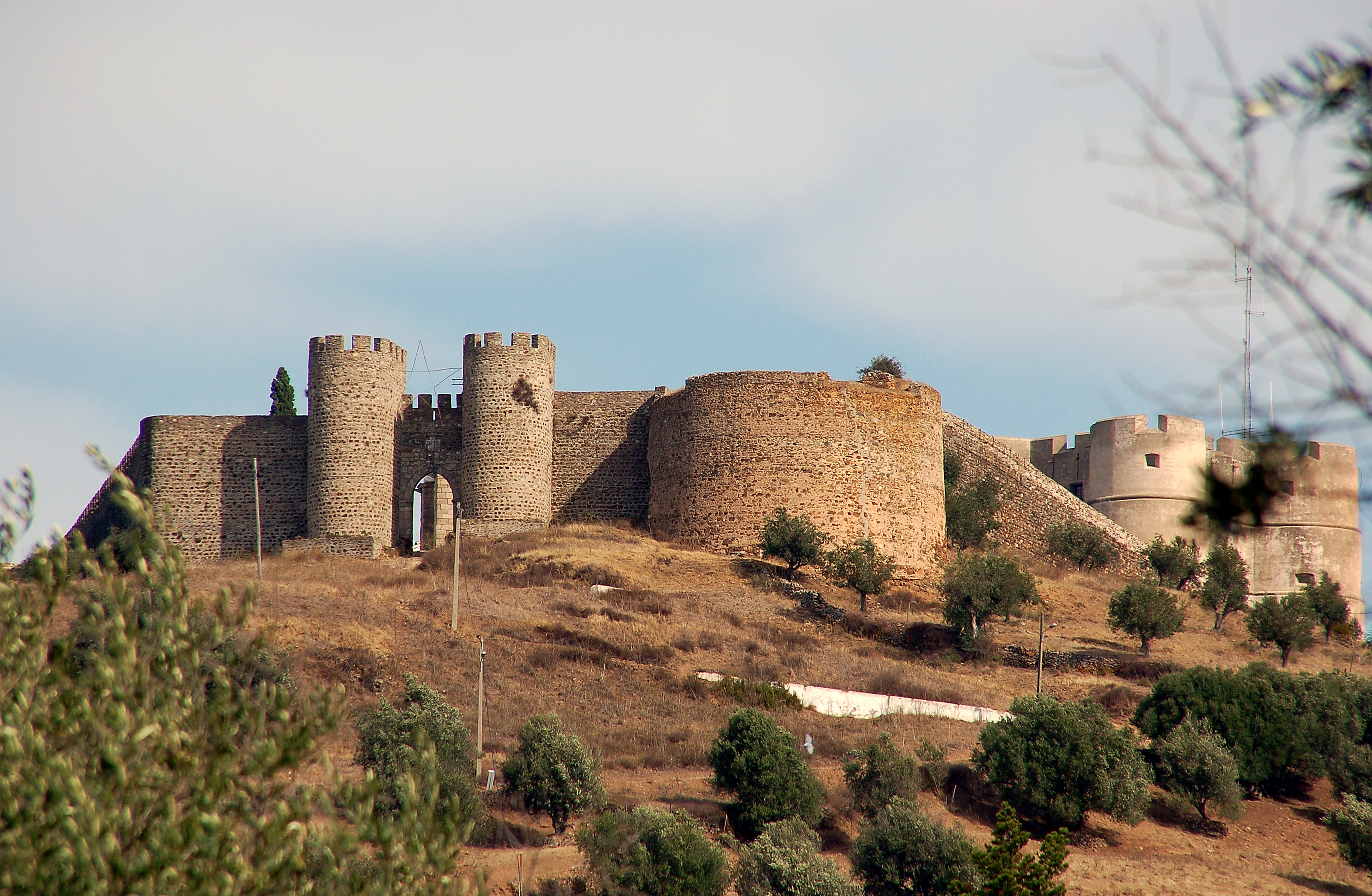 Localizado na Seera de Ossa.